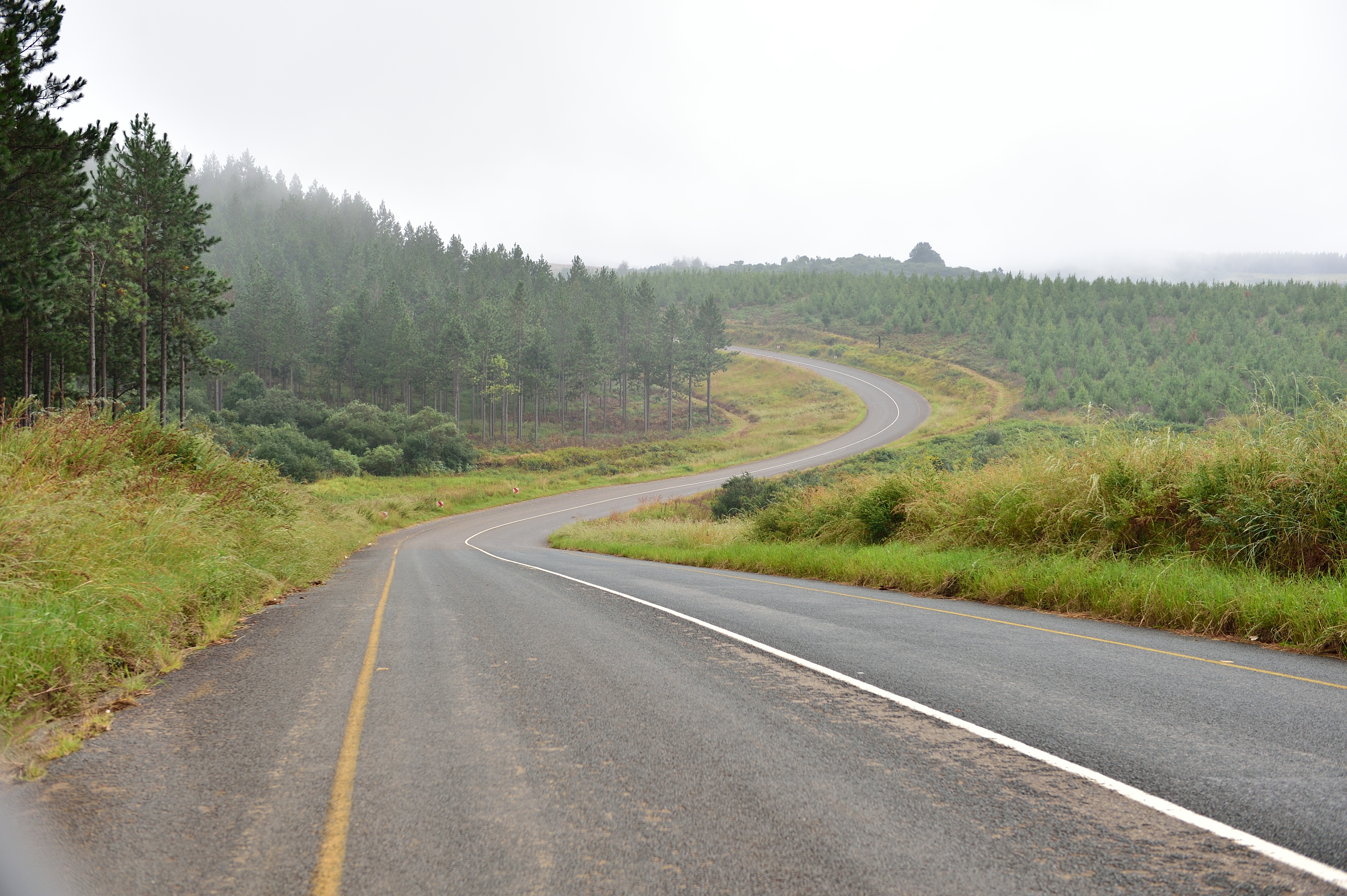 Vue du Mpumalanga.